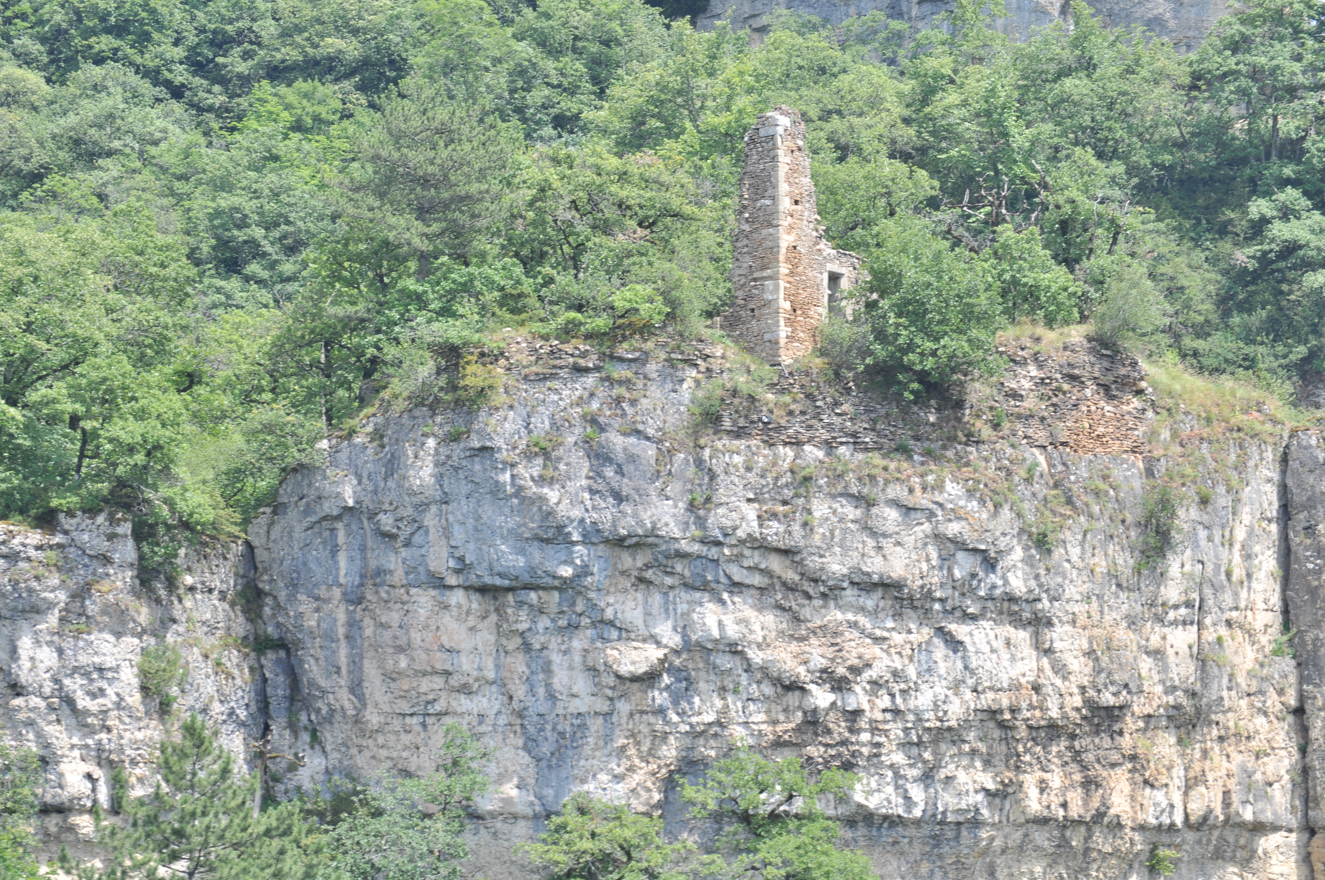 Ruines du château du Cuchet